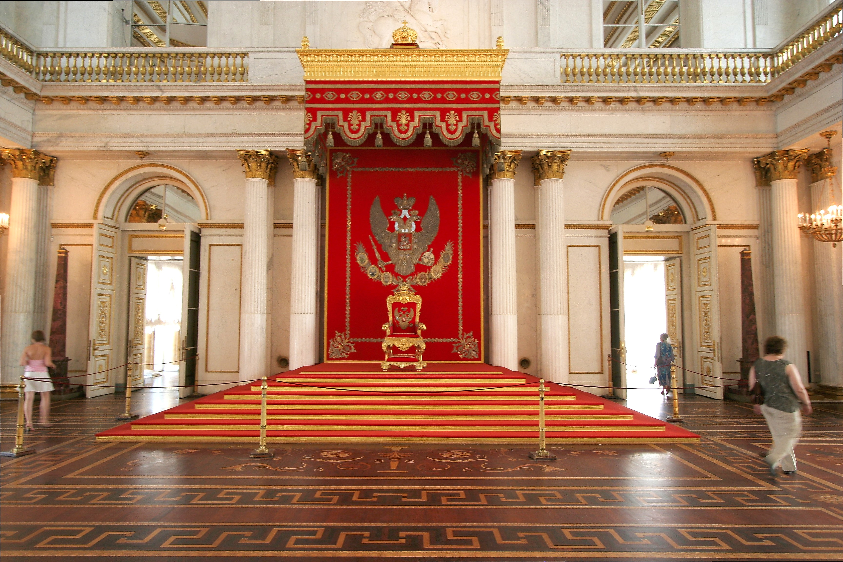 trono kun reprezenta baldakeno en la palaco Ermitejo de la urbo Sankt-Petersburgo, Rusio.